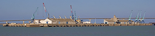 Le môle d'escale du port de La Palisse - La Rochelle Photo issue de ma banque d'images personnelle : Pep.per